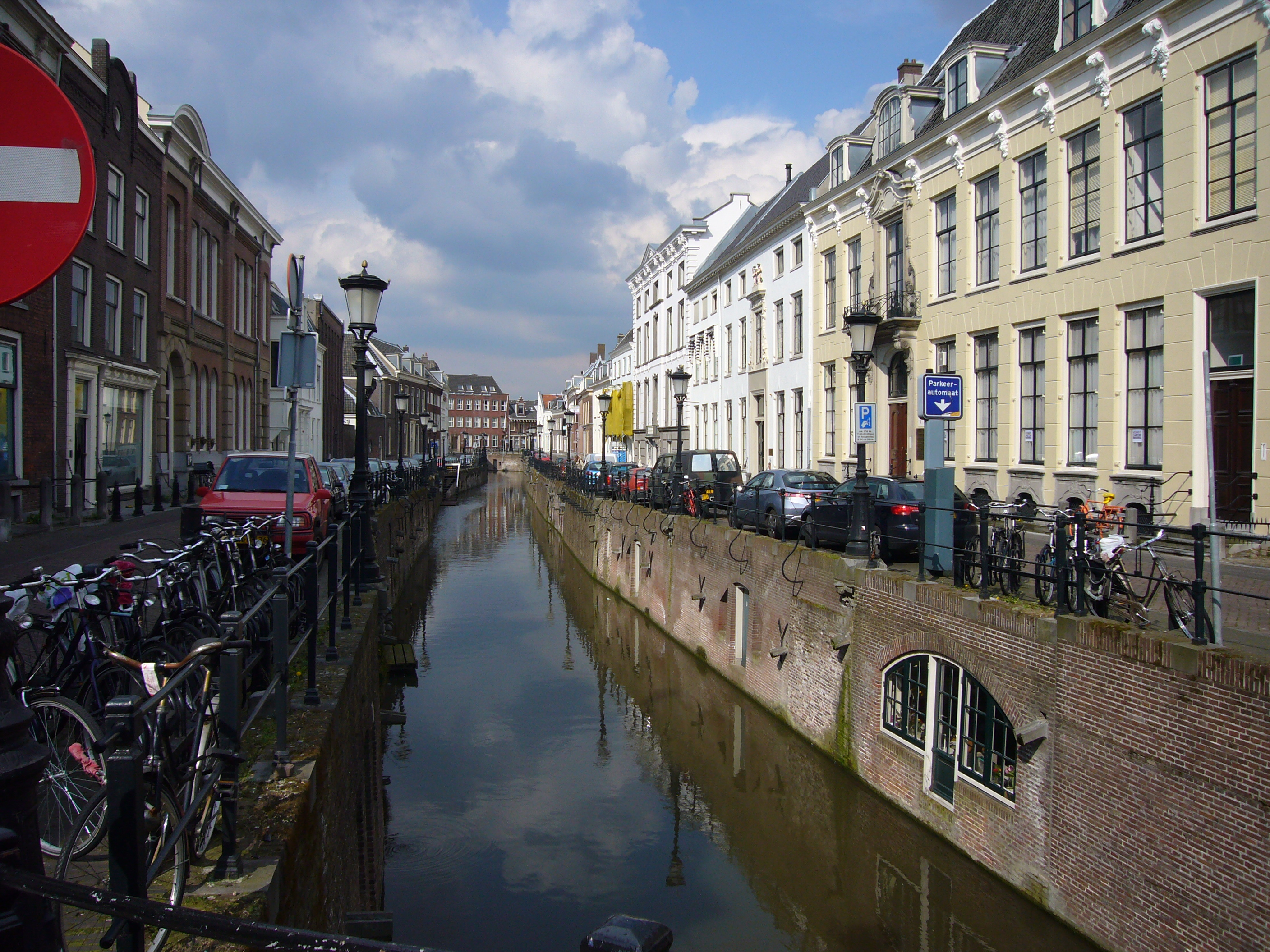 Plompetorengracht in Utrecht